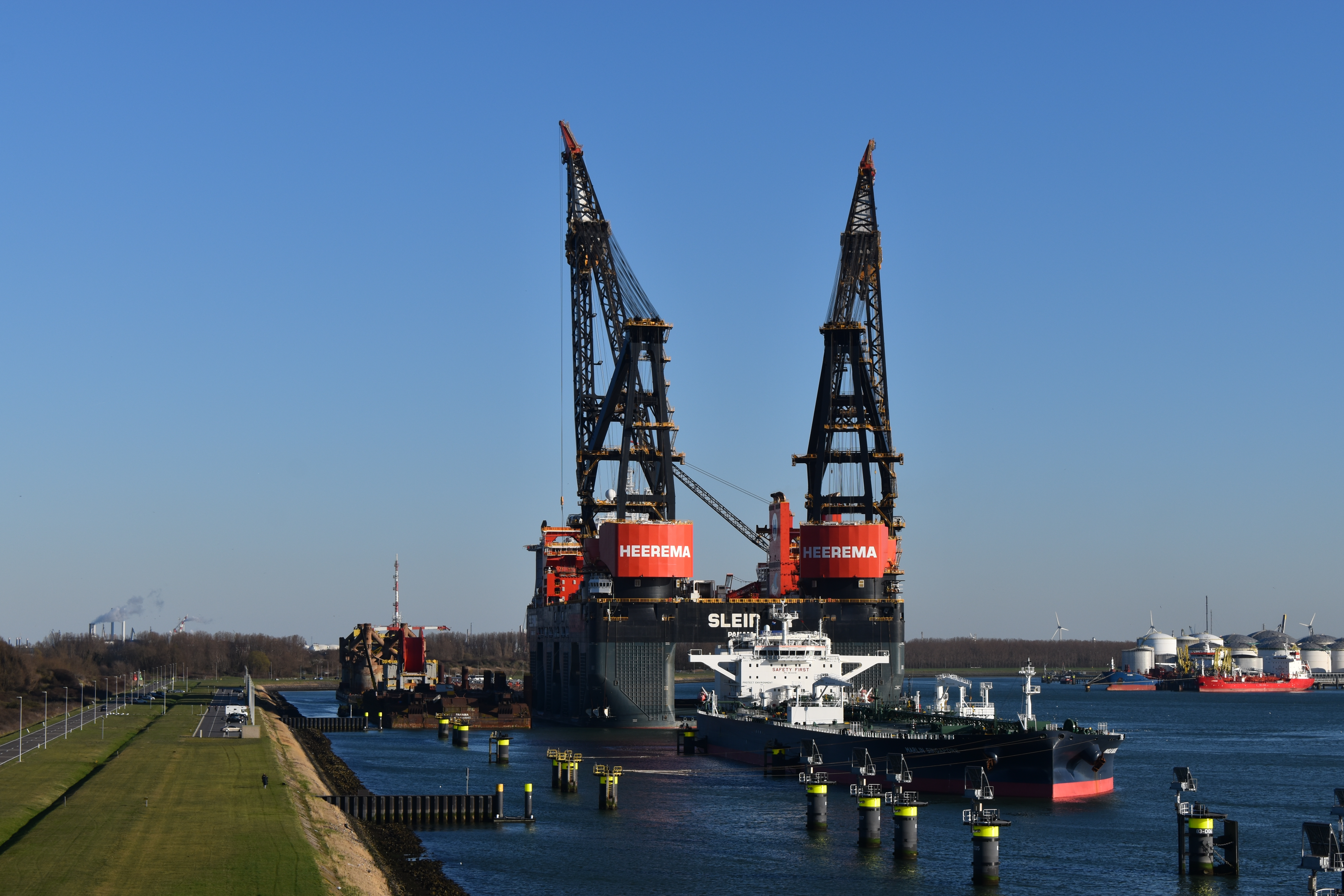 De 10.000 metrische ton Huisman kranen op de Sleipnir te zien in de haven van Rotterdam (Landtong).